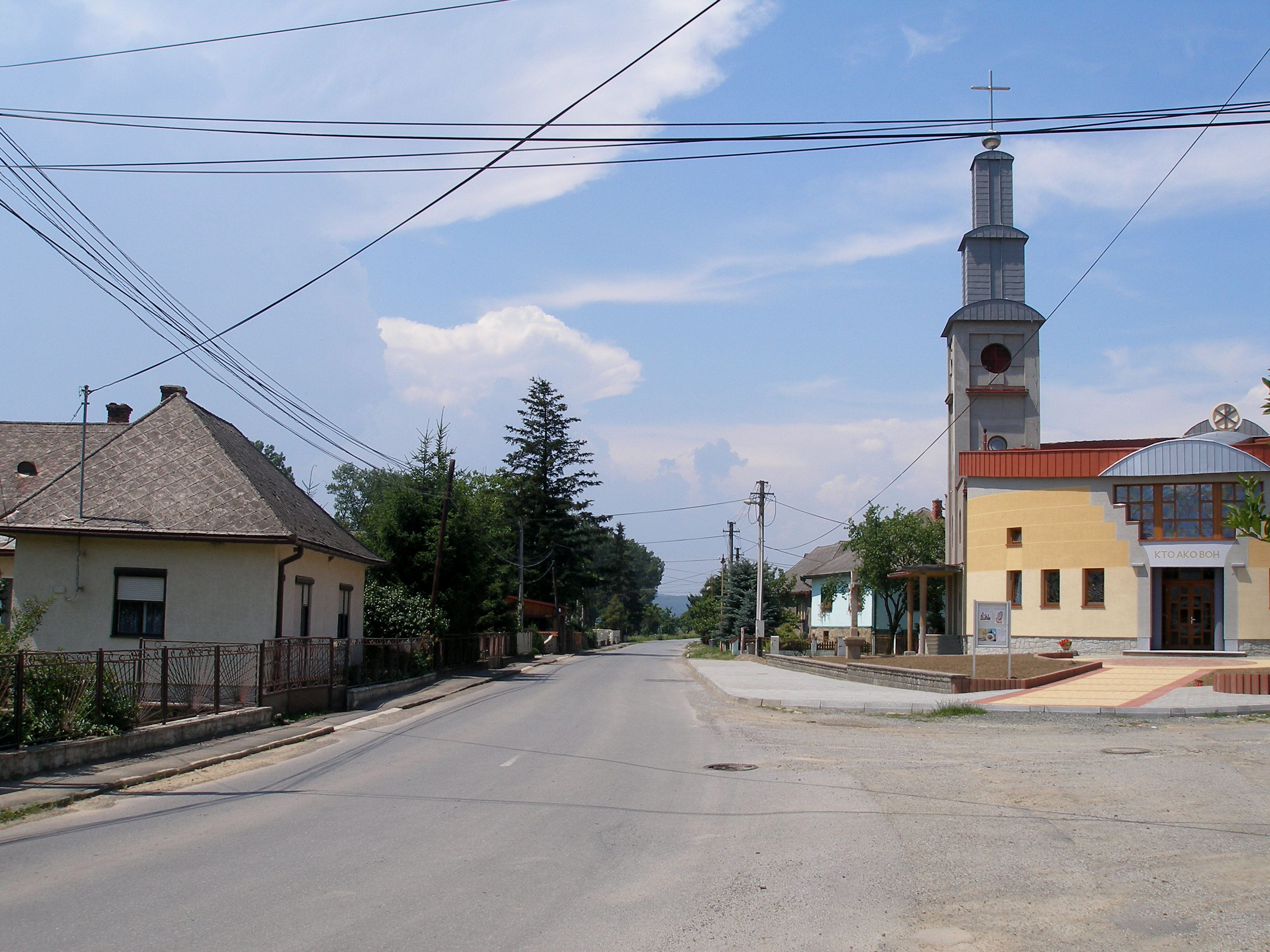 Obec Dulová Ves okres Prešov. Región Šariš.